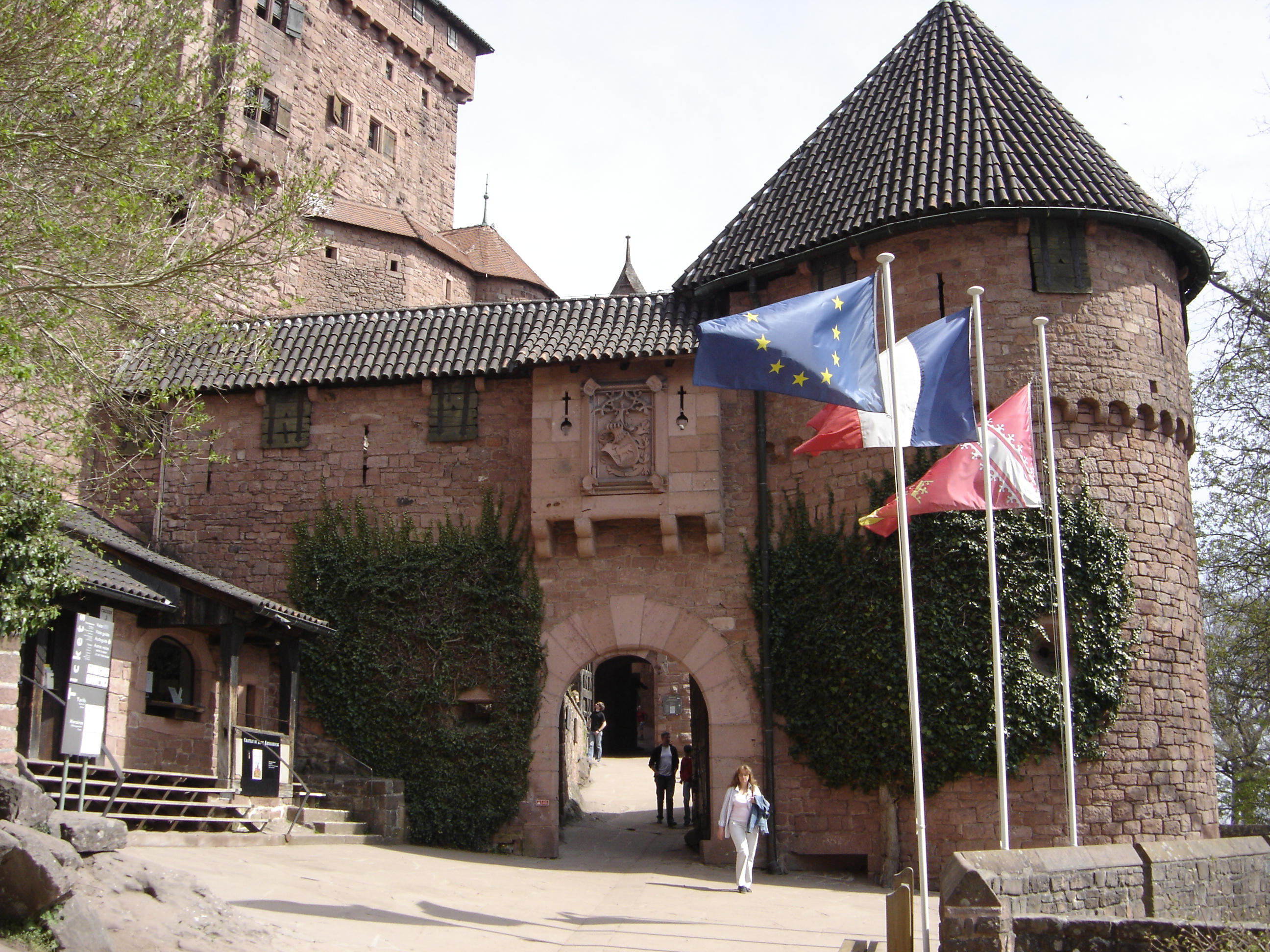 First entrance of the château du Haut-Kœnigsbourg